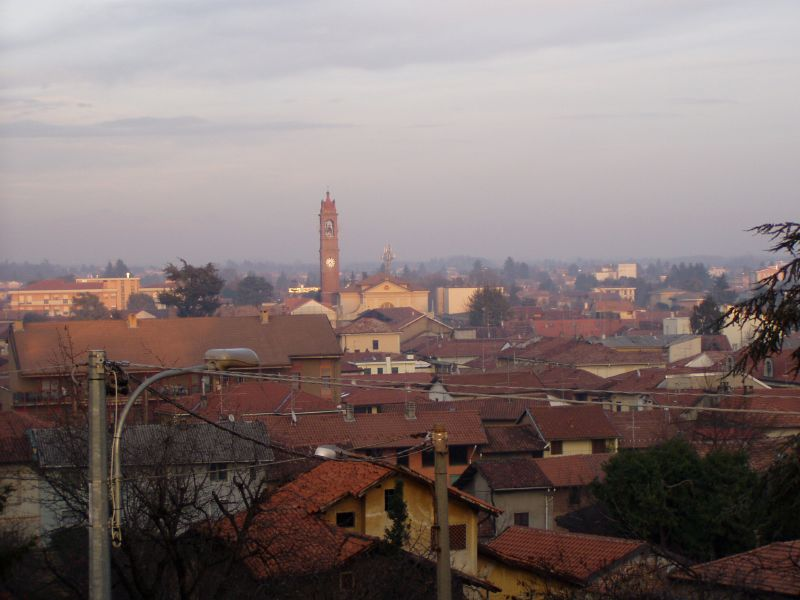 Vista di Cassano Magnago